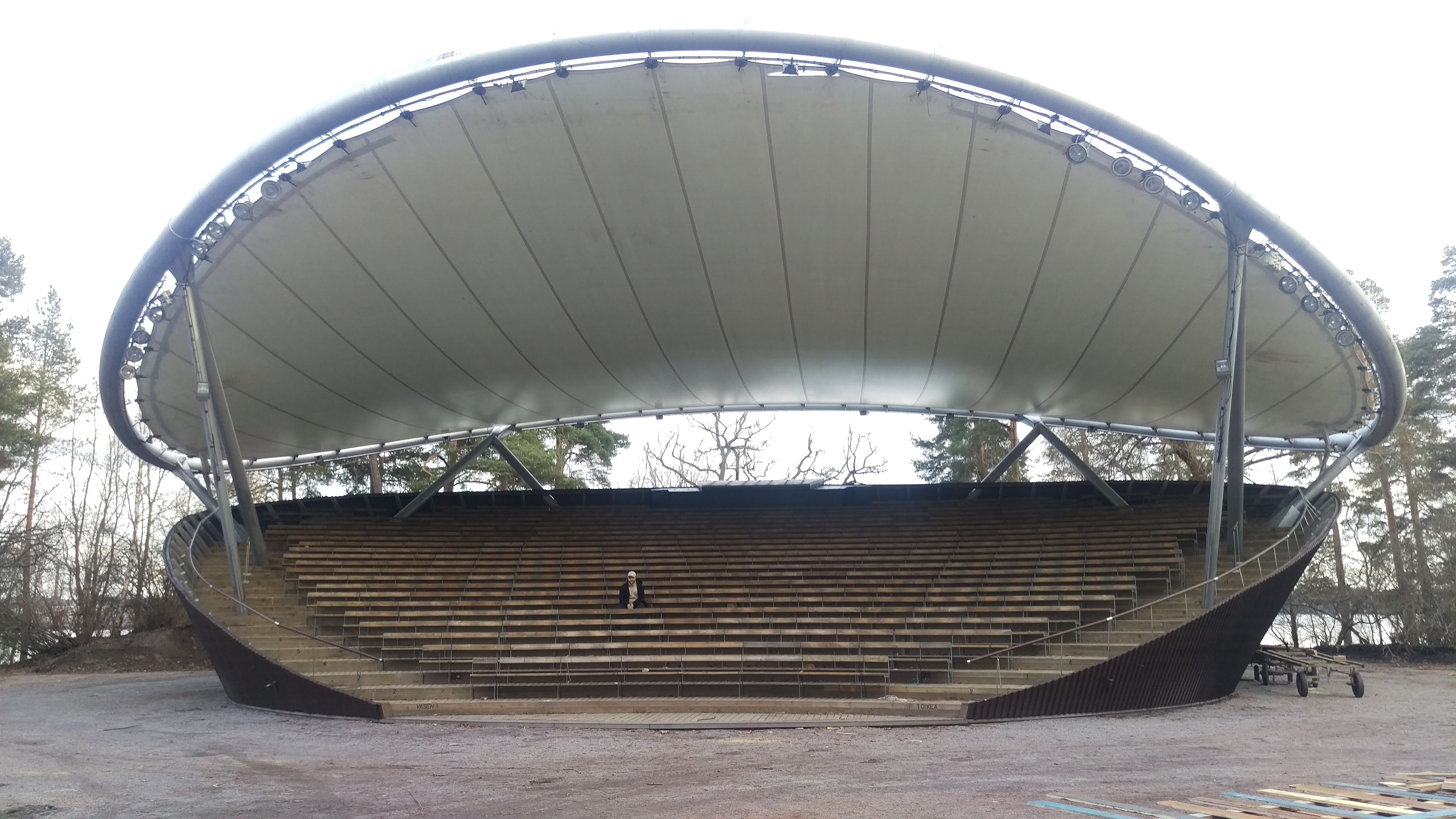 Tampere